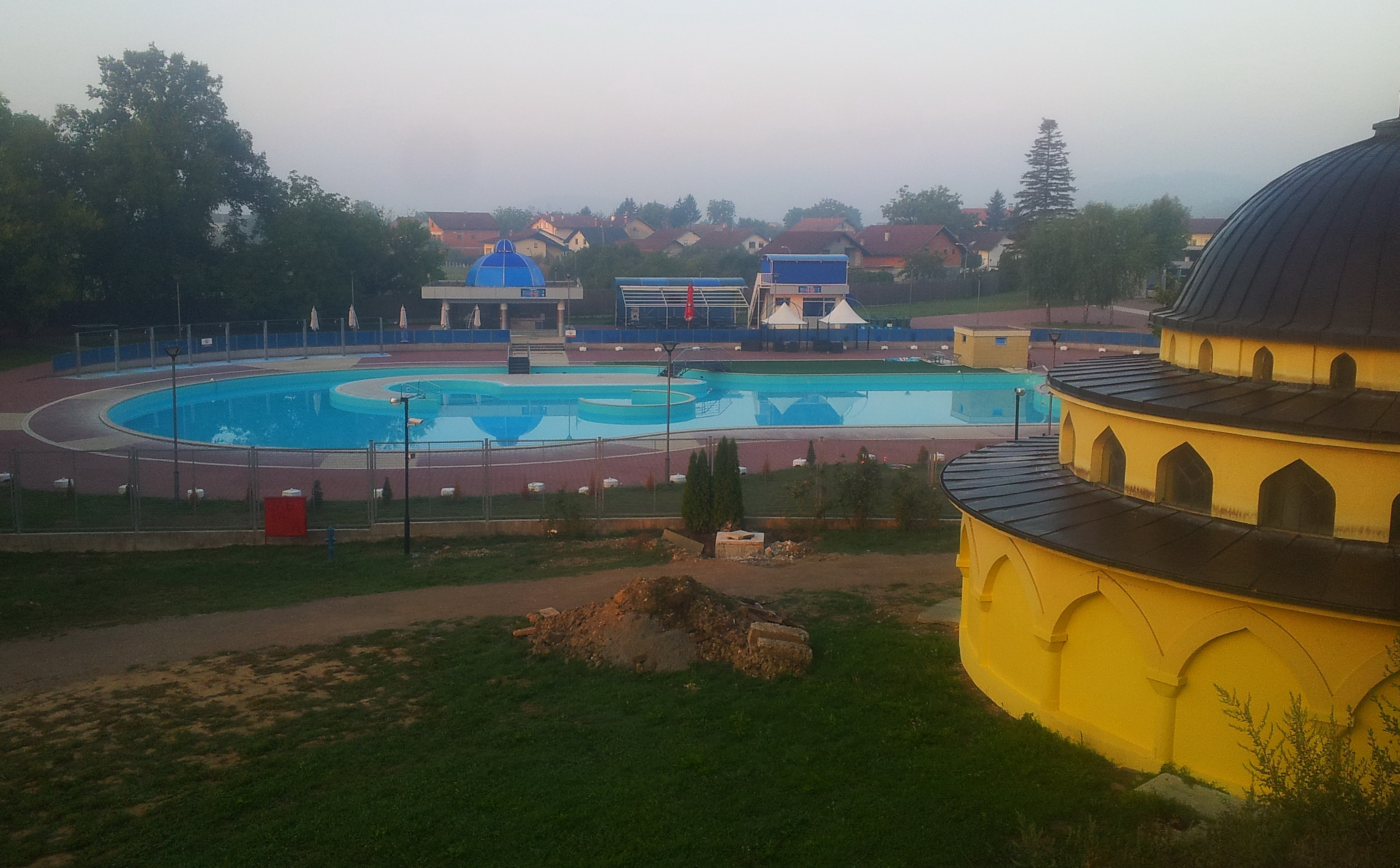 Парк природе Бања Лакташи комкплекс This image was uploaded as part of Trace of Soul 2015.